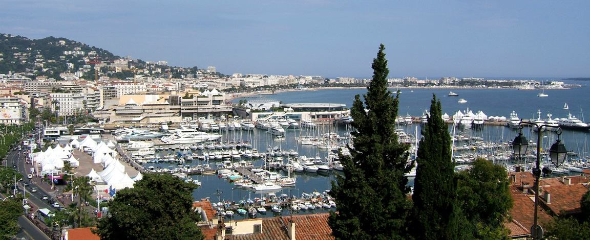 Cannes, France. Le Vieux-Port , le palais des Festivals et des Congrès et au fond la Croisette et les hauteurs du quartier de la Californie